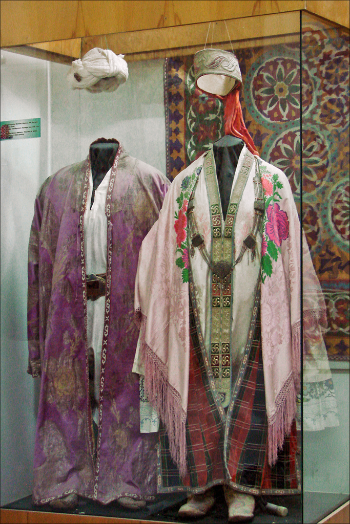 Costumes traditionnels dans une des salles du musée d'ethnographie et de la broderie dans les bâtiments du harem Sitori-i-Mokhi Khosa (Sitoraï Mokhi-Khossa) : "le palais de la lune et des étoiles" était la résidence d'été des derniers Emirs de Boukhra. Il est situé à 4 km au nord de Boukhara. Il s'agit d'une construction récente, commencée à la fin du 19ème siècle par l'Emir Akhad Khan, puis étendue en 1911-1914 par son fils Alim Khan avec le soutien des Russes et sous leur influence. Le dernier Emir a été renversé par les Soviétiques en 1920, il est mort en exil. Le style du palais d'été est composite, associant l'architecture russe à des éléments décoratifs de l'Asie centrale. L'architecte principal était Ousto Khodja Khafiz. Le palais comprend trois corps de bâtiments qui ont été transformés en musées : les appartements et salles de réception (musée des arts appliqués), le palais octogonal pour les invités (musée des costumes) et le harem (musée d'ethnographie et de la broderie).